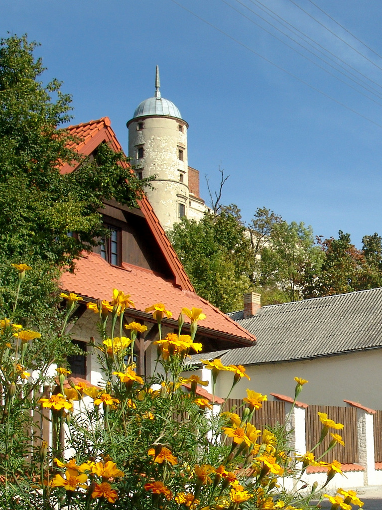 Janowiec, ruiny zamku, XVI-XX